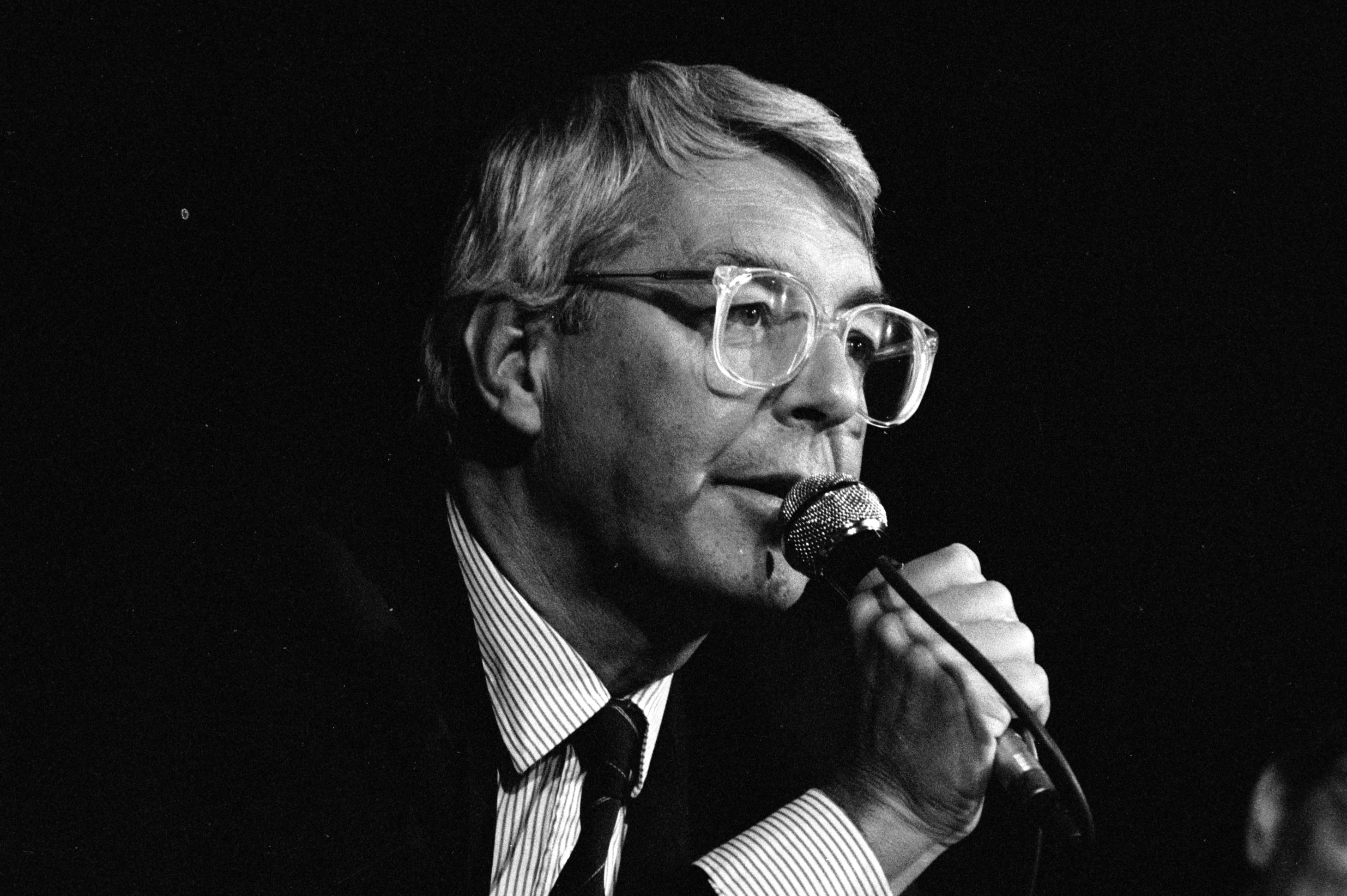 Le journaliste François-Henri de Virieu à Deauville (Calvados, France) en septembre 1989.